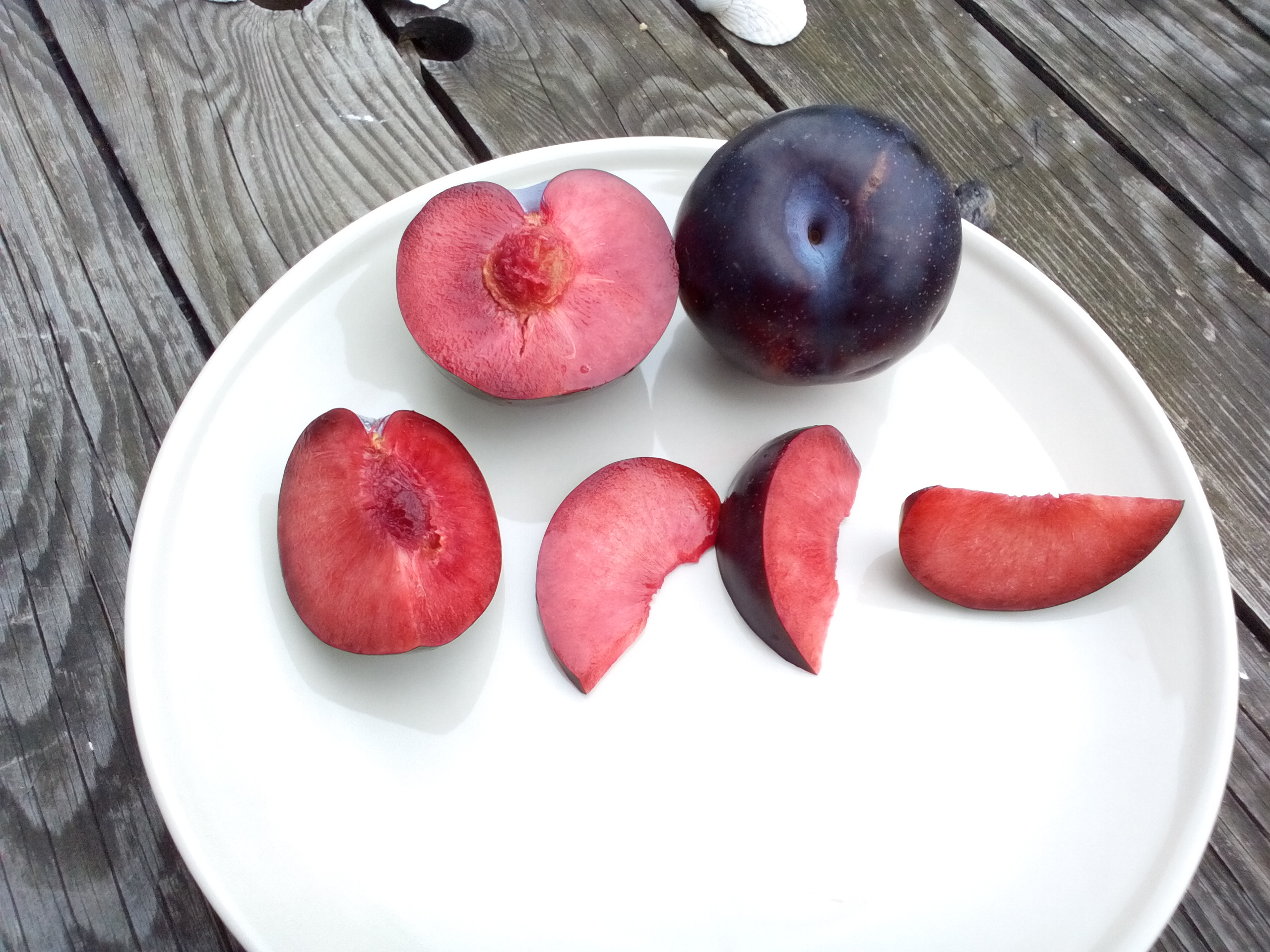 Plumcots, Aprikosen-Pflaumen-Hybride